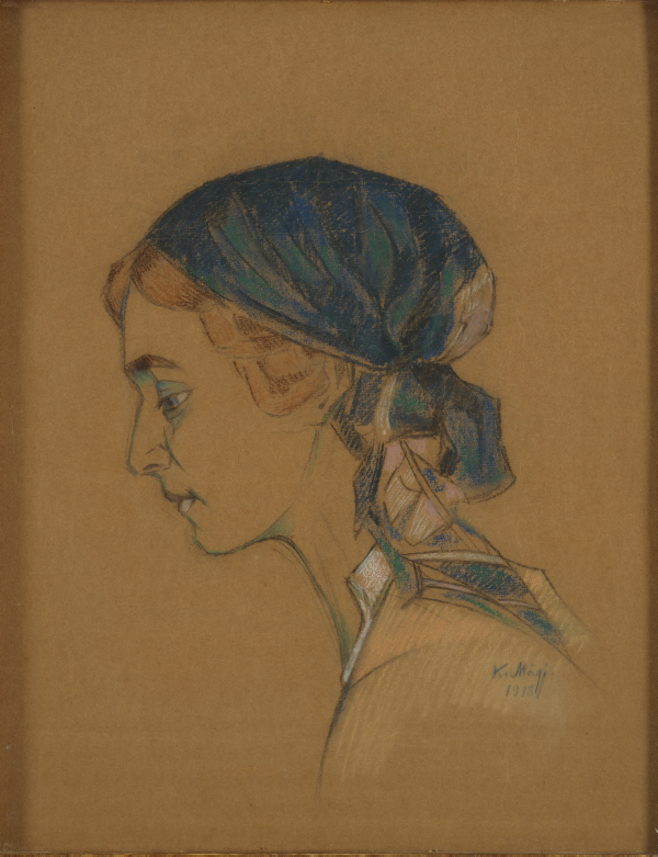 MuuseumikoguMaalikoguOlemusmaalKunstiese